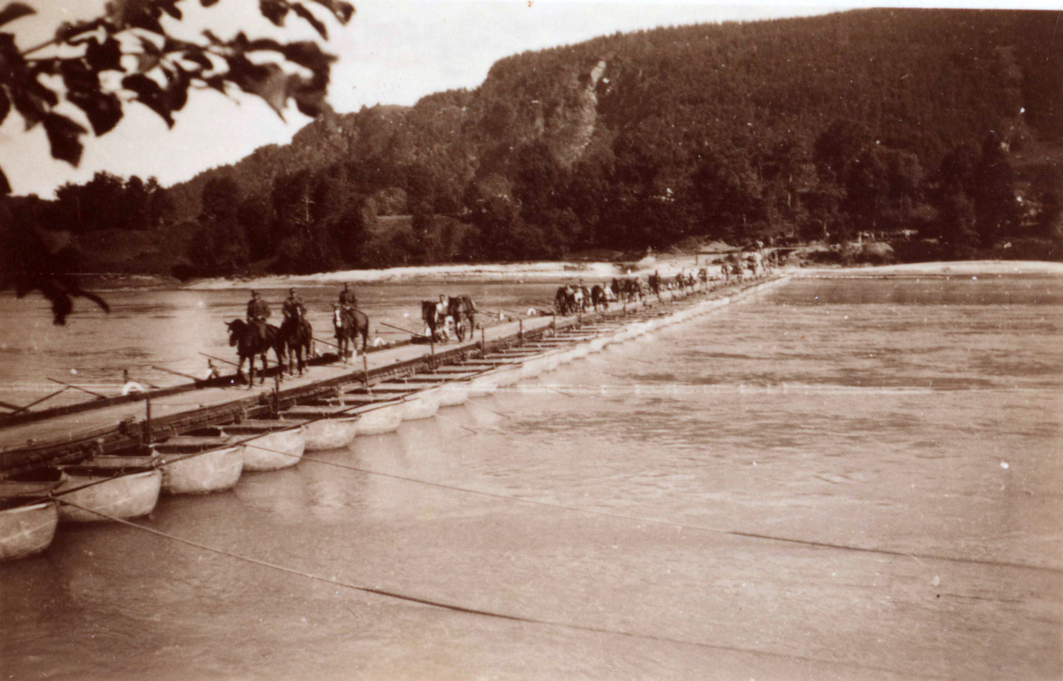 Bergjegere fra 137. bergjegerregiment på vei over flytebro (pongtongbro), Selfors. Tittel / Title: Pongtongbru Selfors Dato / Date: Mai, 1940 Fotograf / Photographer: Ukjent/Unknown Sted / Place: Selfors, Nordland, Norge Eier / Owner Institution: Arkiv i Nordland Lenke / Link: Arkiv i Nordland Arkivreferanse /Archive reference: AIN.NA143.0028 Fra Dag Skogheims Privatarkiv Tekst bak på bildet: Der tross btl. Sorko passiert die pontonbricke bei Selfors Mo i Rana, unterhalb der gesprengten brücke, mai 1940.